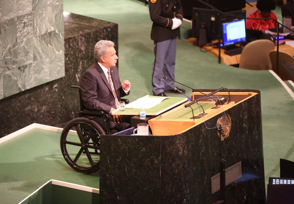 2017-09-20 Intervención de Presidente Lenin Moreno en el pleno de las Naciones Unidas